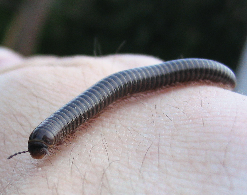 Doppelfüßer / Cylinroiulus caeruleocinctus